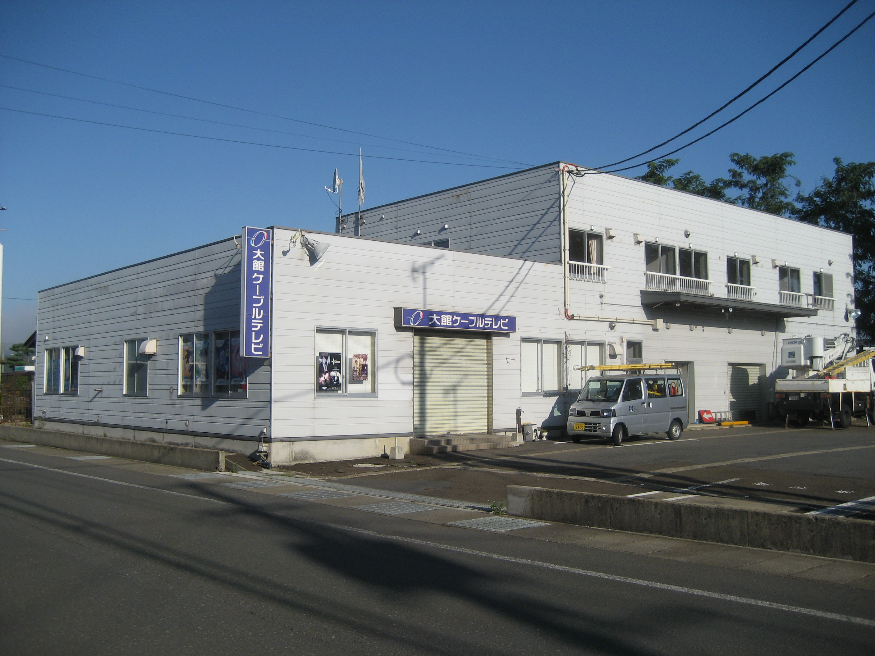 秋田県大館市にある大館ケーブルテレビ局舎